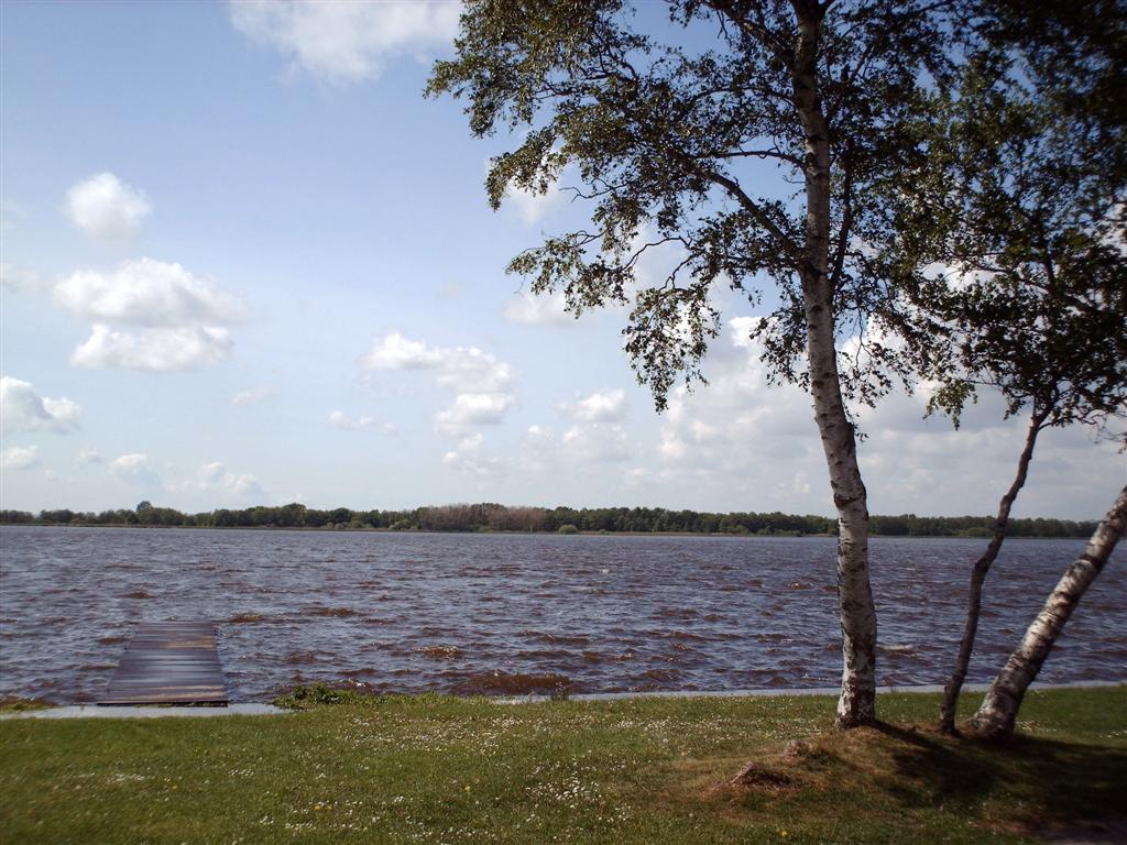 Nannewiid (Nannewijd), een meer bij Oudehaske. (lake)